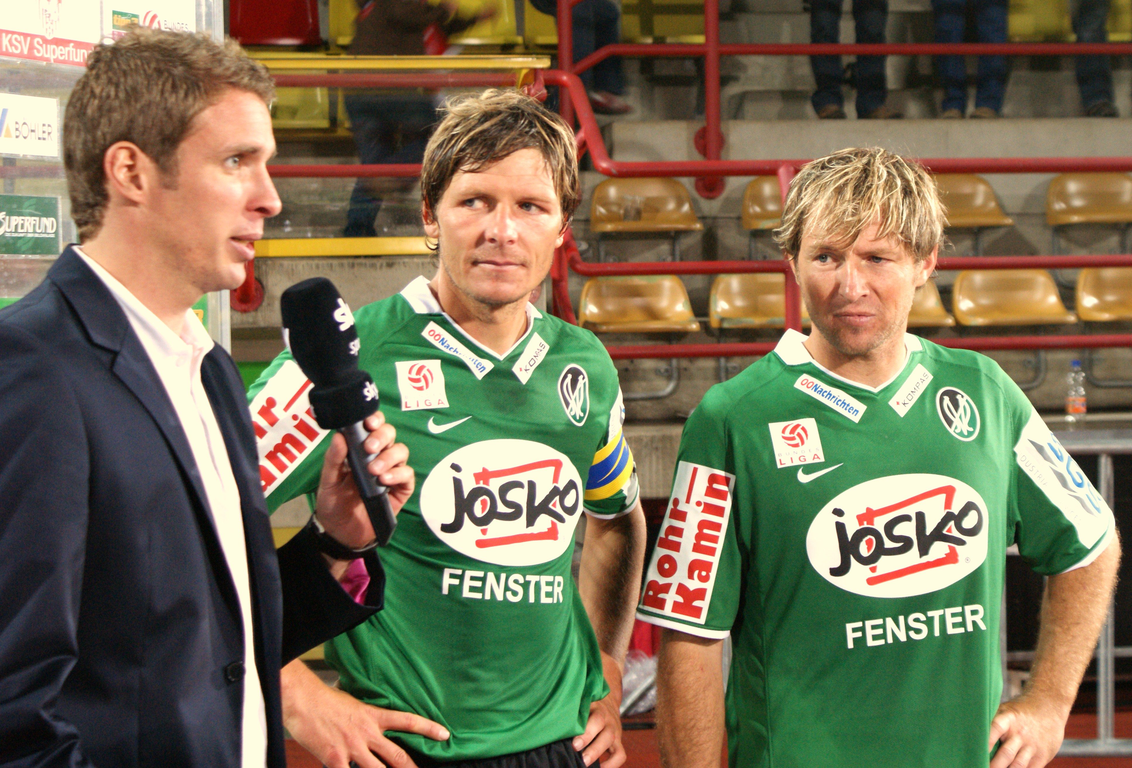 Oliver Glasner und Herwig Drechsel, Spieler der SV Ried, mit einem Kommentator des Pay-TV-Senders Sky Österreich